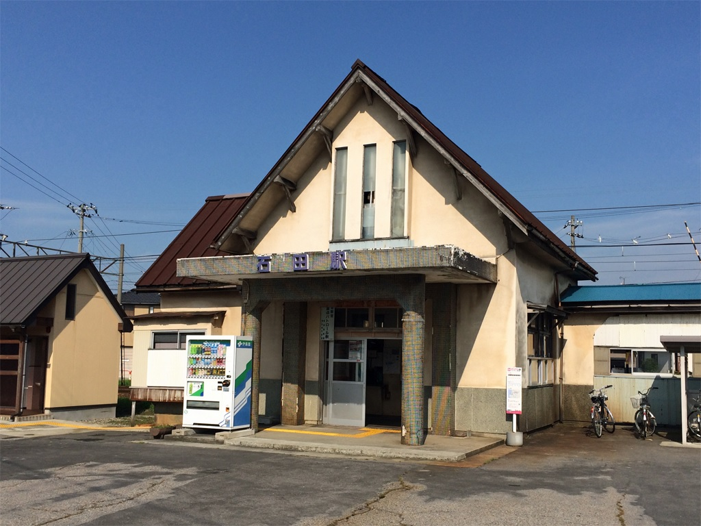 富山地方鉄道本線 電鉄石田駅 駅舎